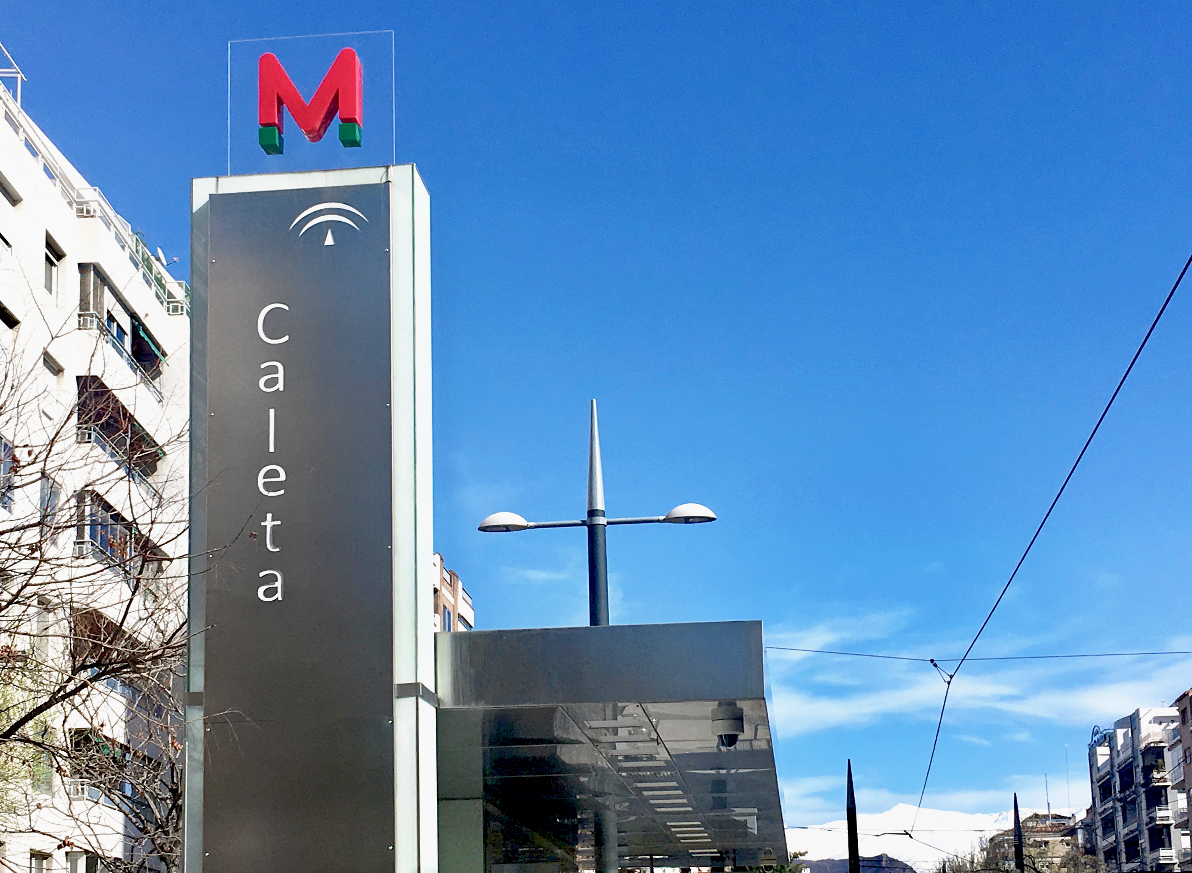 Detalle del identificativo y logotipo del Metro de Granada en la Estación de Caleta. Al fondo se aprecia el Pico Veleta de Sierra Nevada.